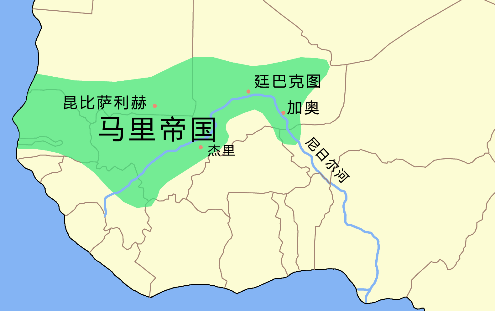 马里帝国疆域（1350年前后）